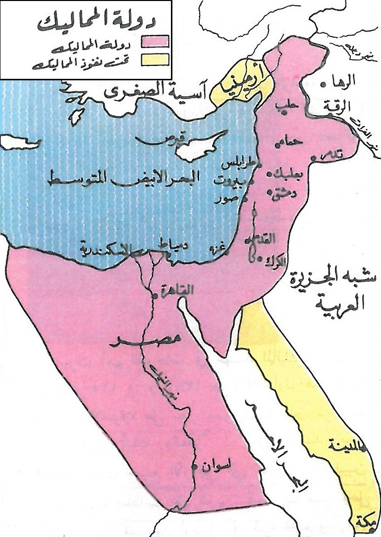 خريطة الدولة المملوكيَّة في عهد المماليك البحريَّة.